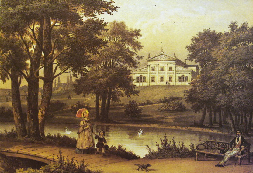 Tuskulėnai Manor